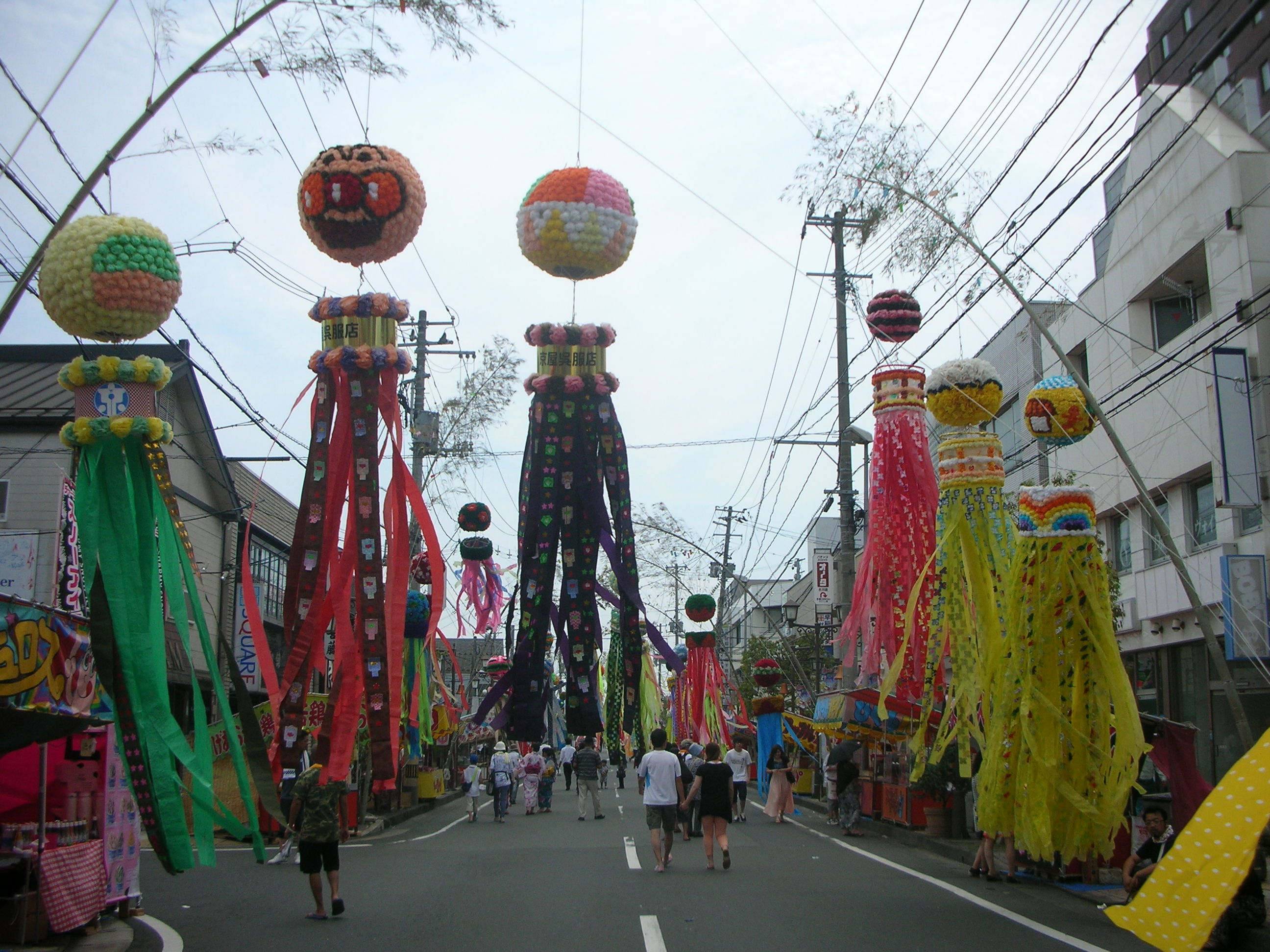 古川まつり2015 8月3日